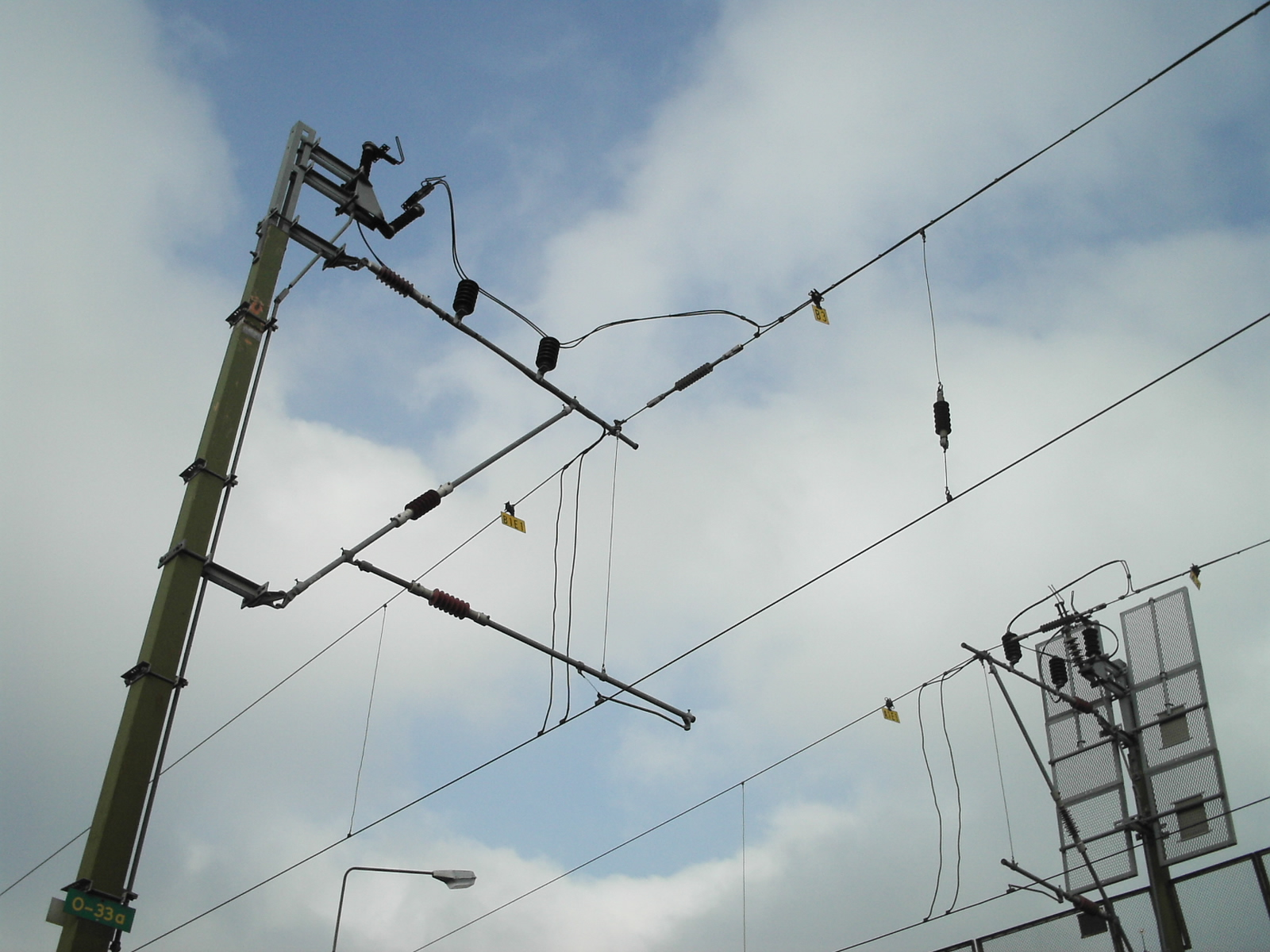 Sektionsfrånskiljare